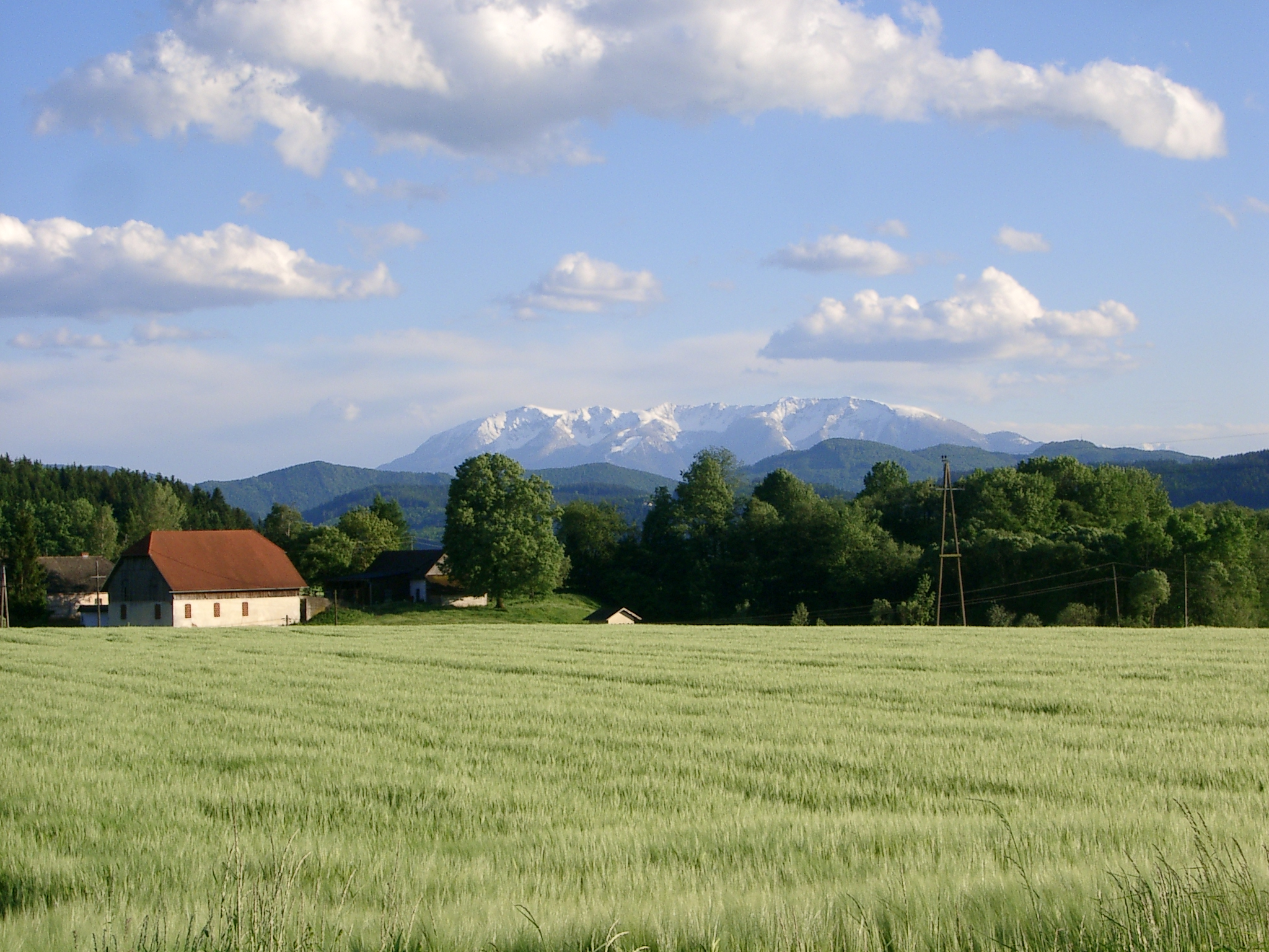 Das Petzen Bergmassiv in Kärnten an der Grenze zu Slowenien gelegen.